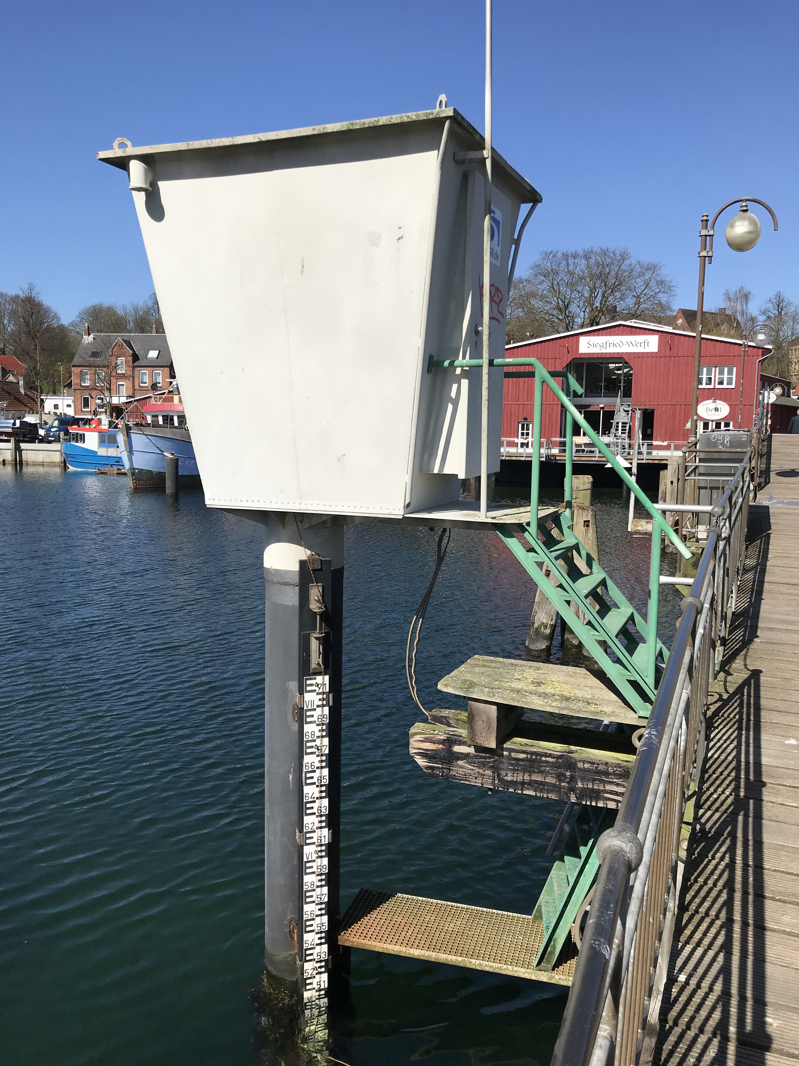 Automatischer Pegel der Ostsee im Hafen von Eckernförde.